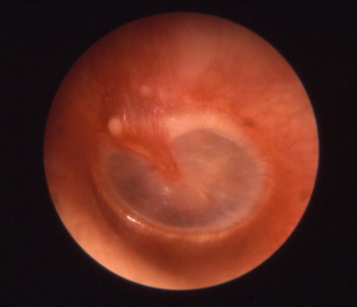 incipiente Otitis media acuta - Hyperämie